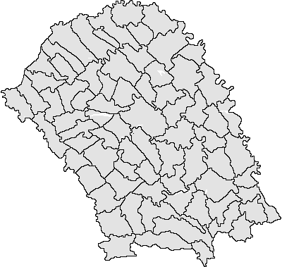 Categorie:Hărţi ale judeţului Botoşani